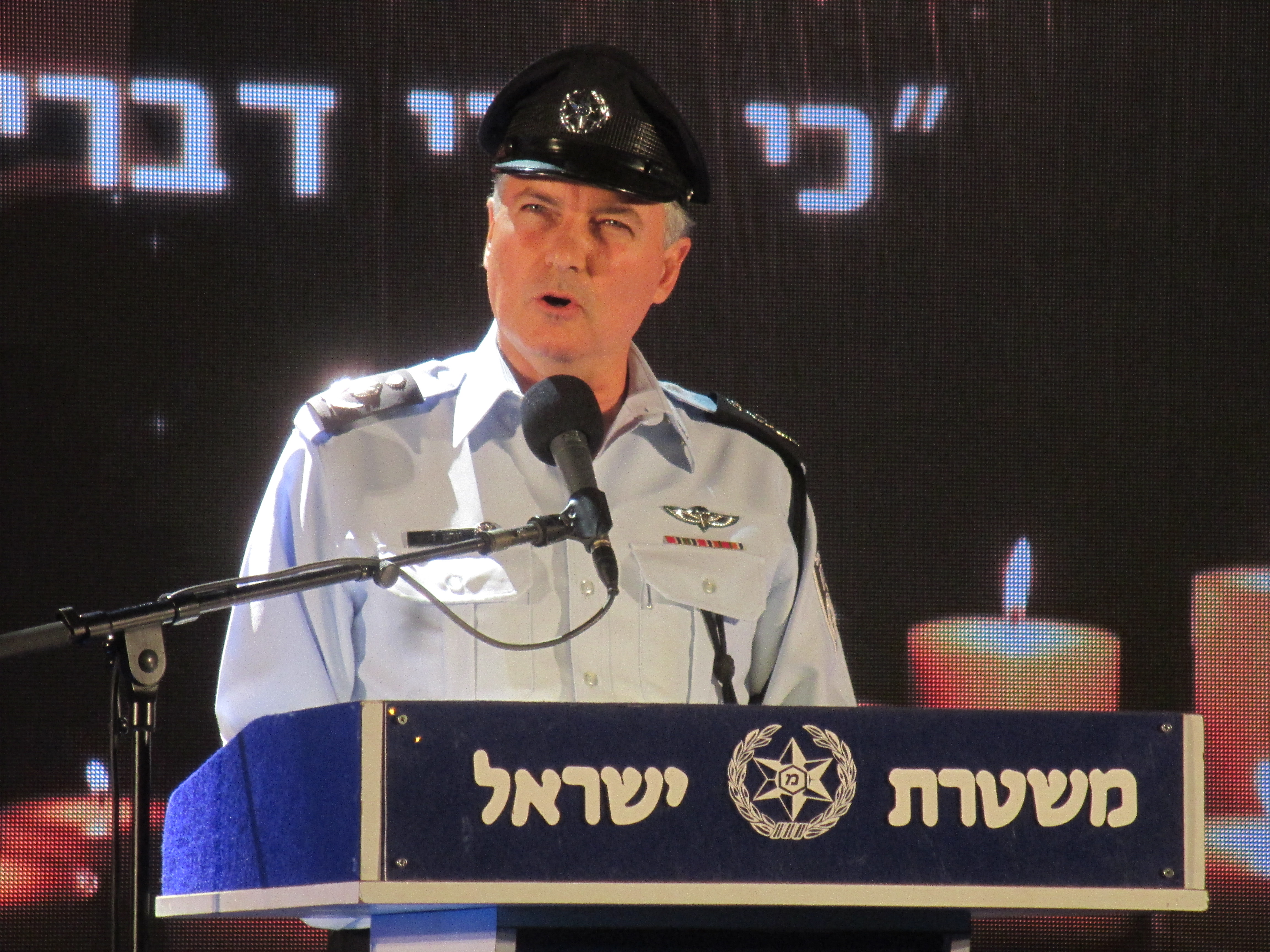 יוחנן דנינו בטקס אזכרה לחללי משטרת ישראל, 2015